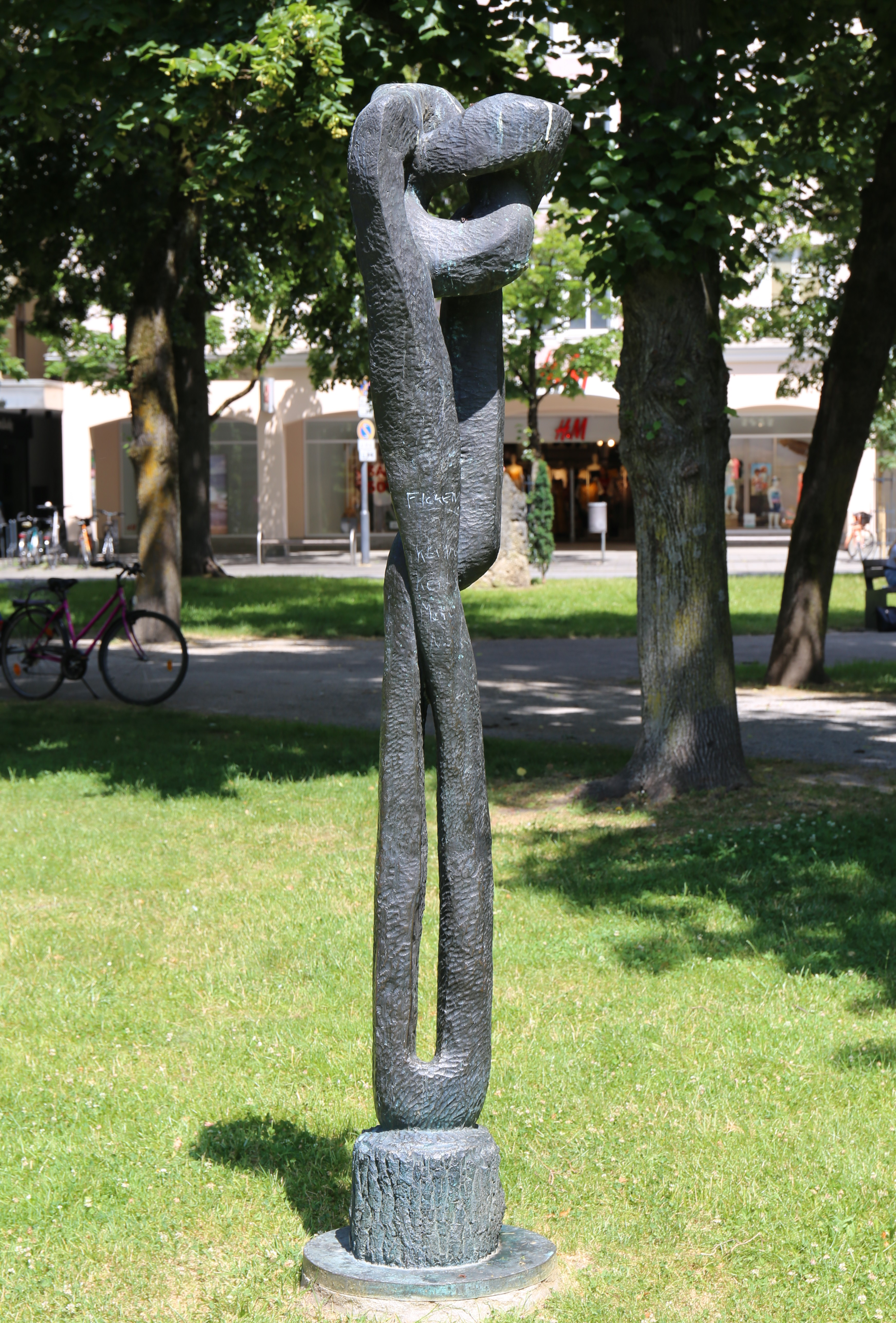 Louise Stomps, Norne, 1985, Bronze; Salingarten, Rosenheim